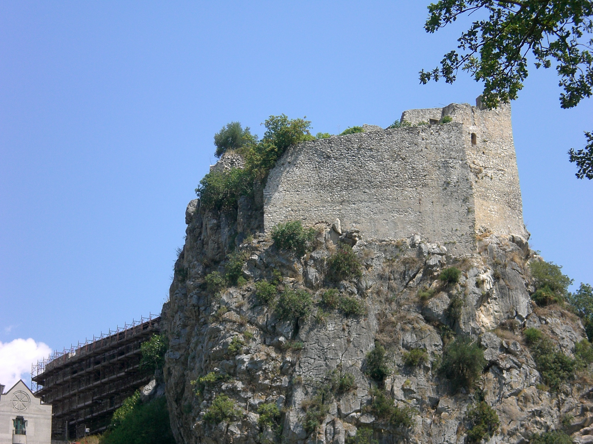 Castello di Balvano